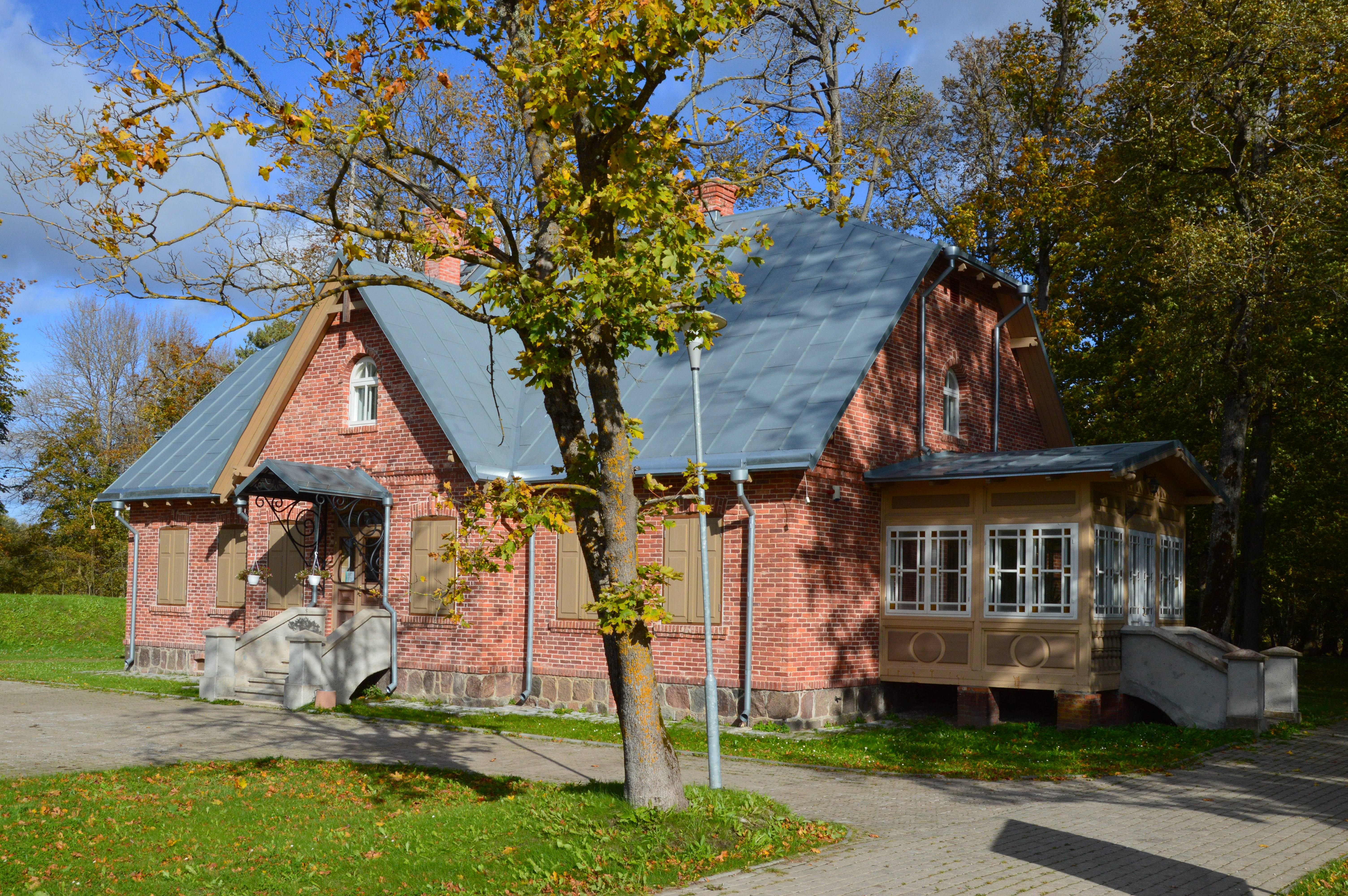 Kurtna mõisa valitsejamaja